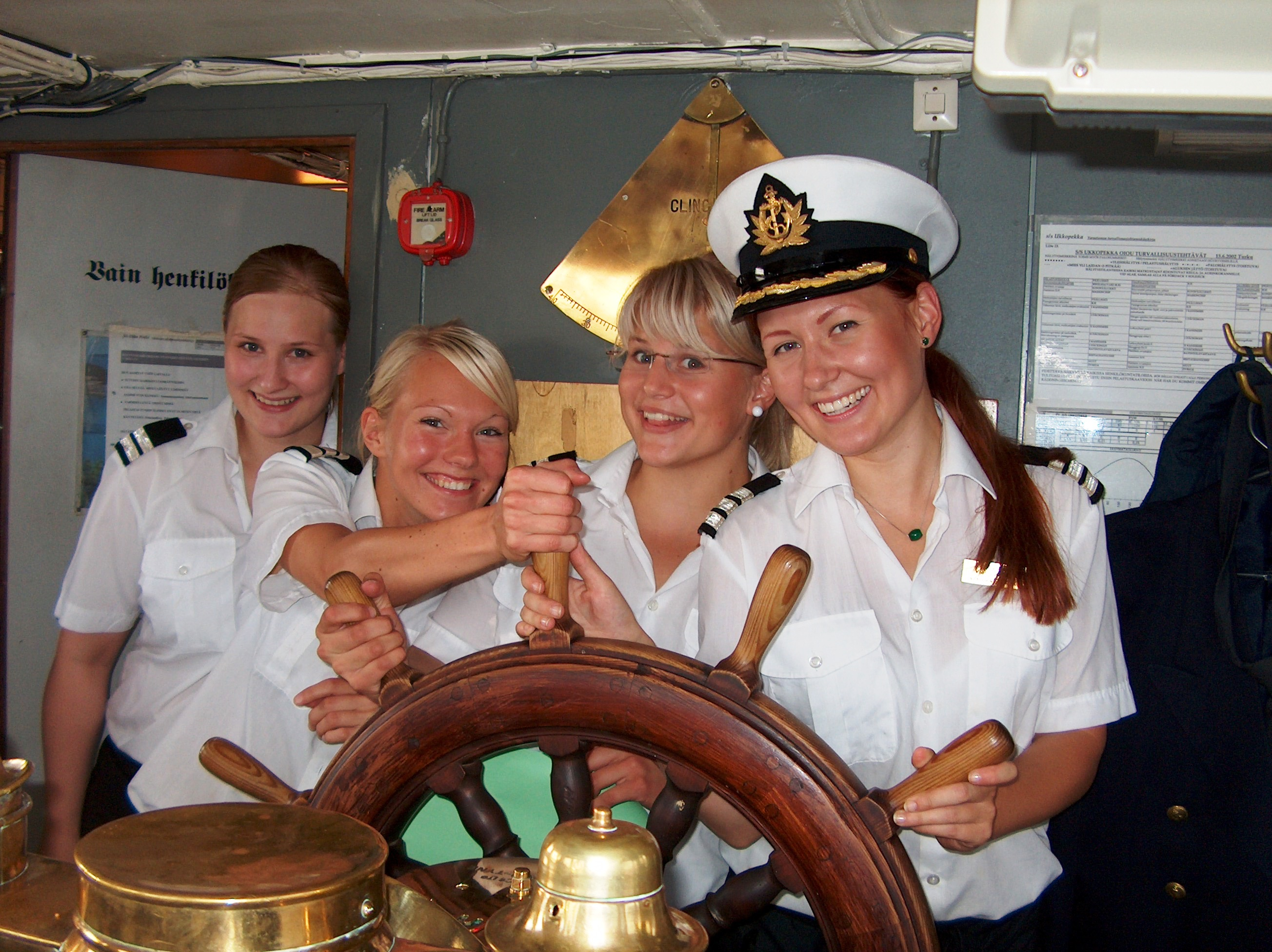 s/s Ukkopekka 2005